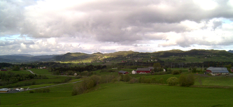 Skjelstadmark, Stjørdal, Norway.